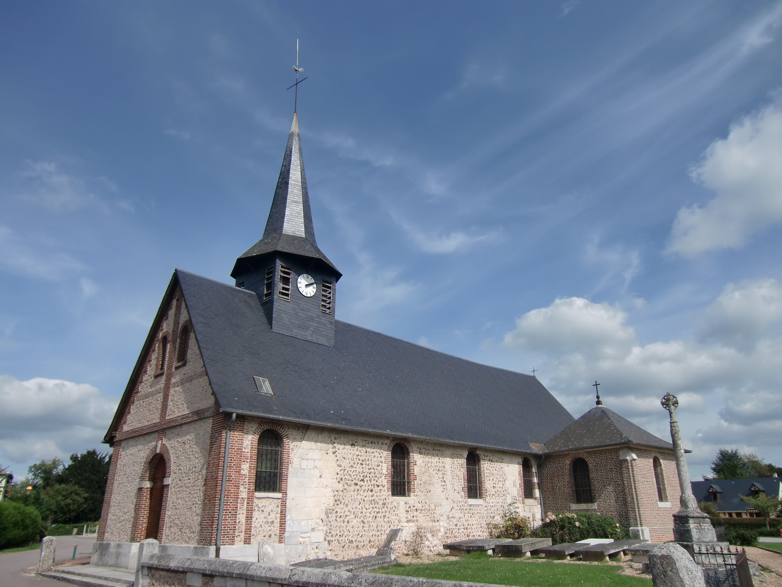 église de Saint-Ouen-de-Thouberville et (sur la droite) la croix de cimetière classée (Eure, Normandie, France)